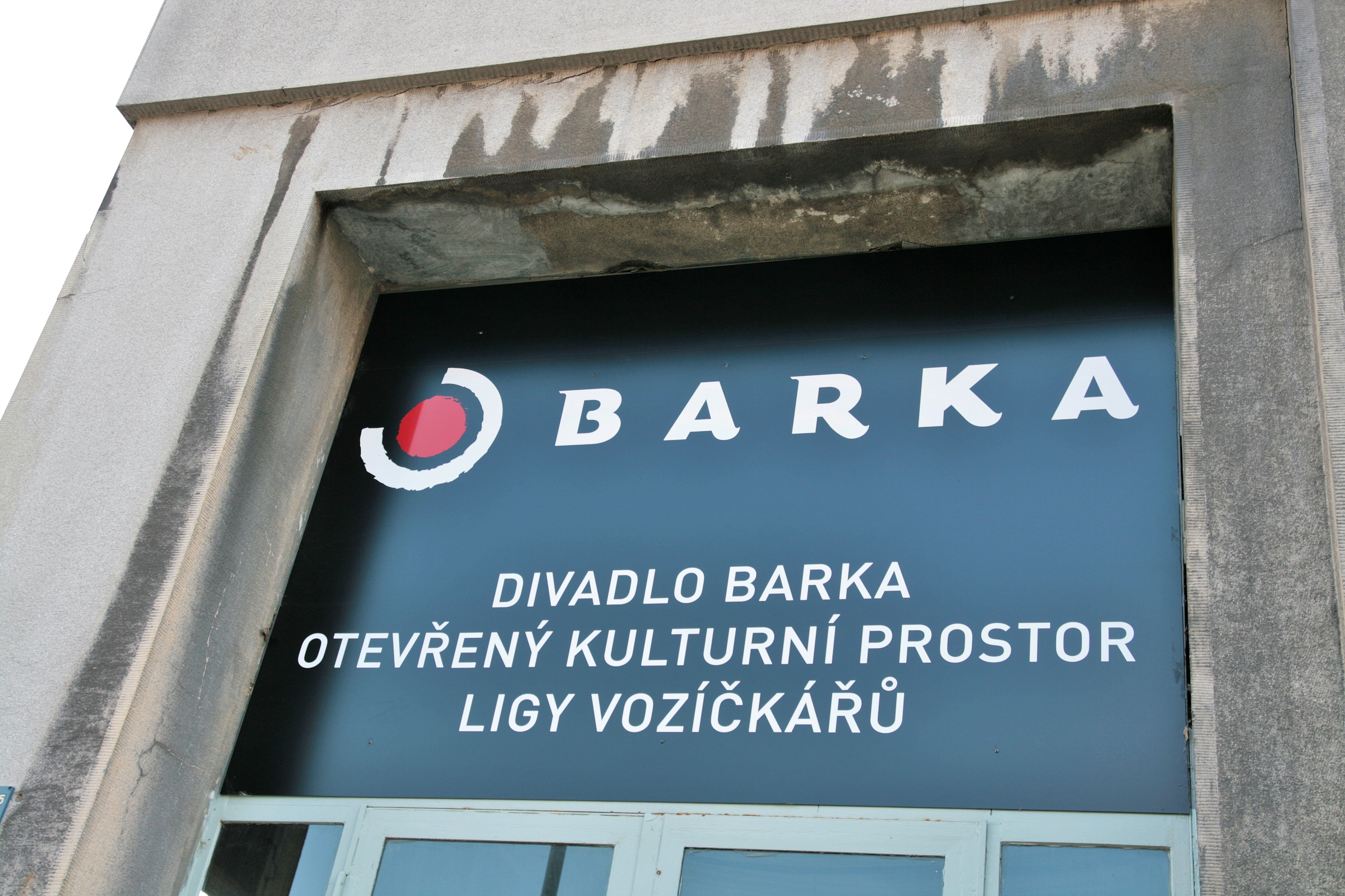 Divadlo Barka, otevřený kulturní prostor Ligy vozíčkářů, Svatopluka Čecha 1405/35a, Brno-Královo Pole. Označení divadla nad vstupem.